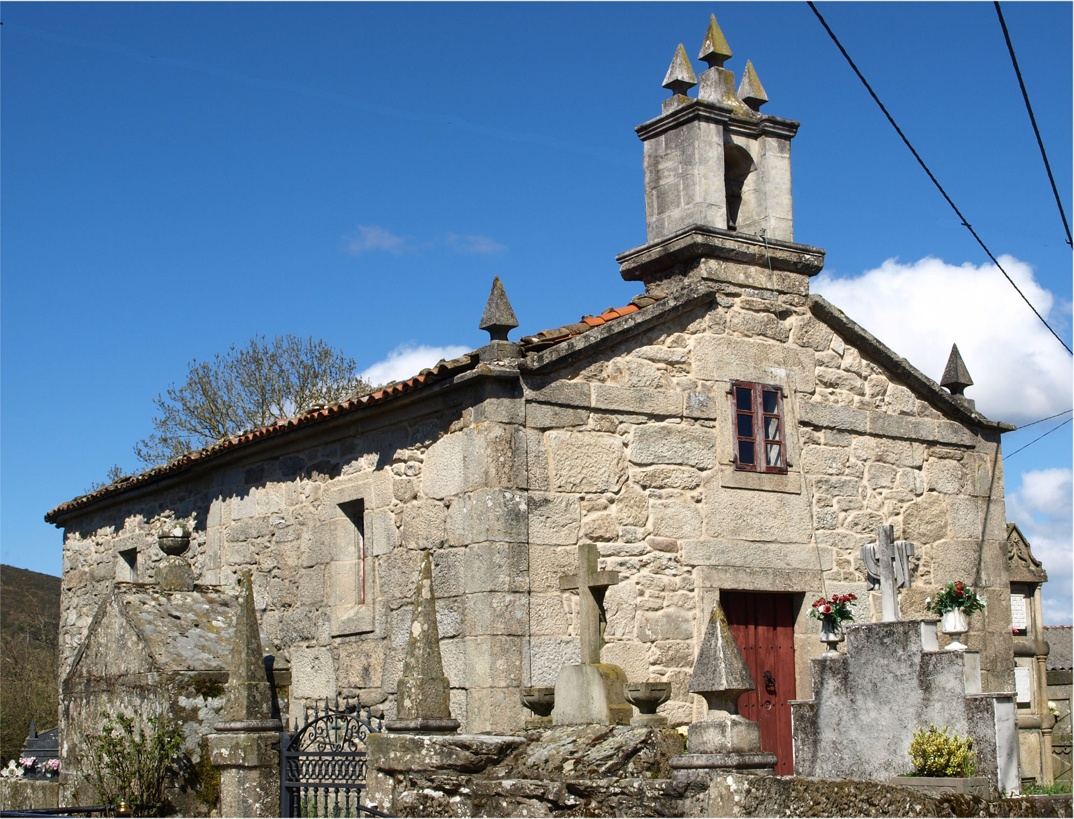 Igrexa do Cibreiro (Antas de Ulla) (Única do Concello con porta principal cara o nacente)